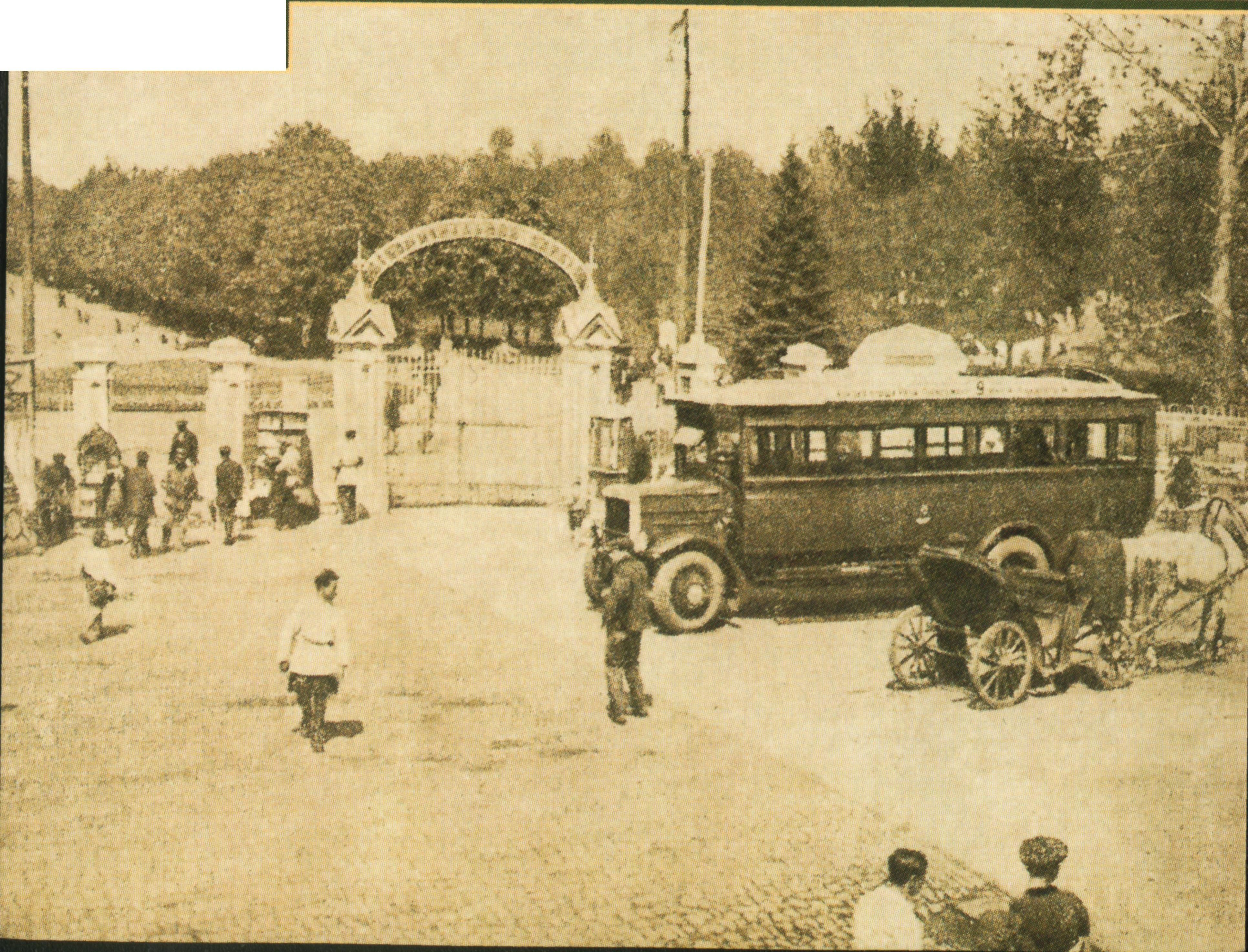 Коммунальный парк (до революции Николаевский либо Загородный, позднее Парк Горького). Центральный вход с улицы Сумской. Видна правая часть центральной аллеи. Статуи Горького на клумбе ещё нет. Почтовая открытка СССР. Конец 1920-х годов.